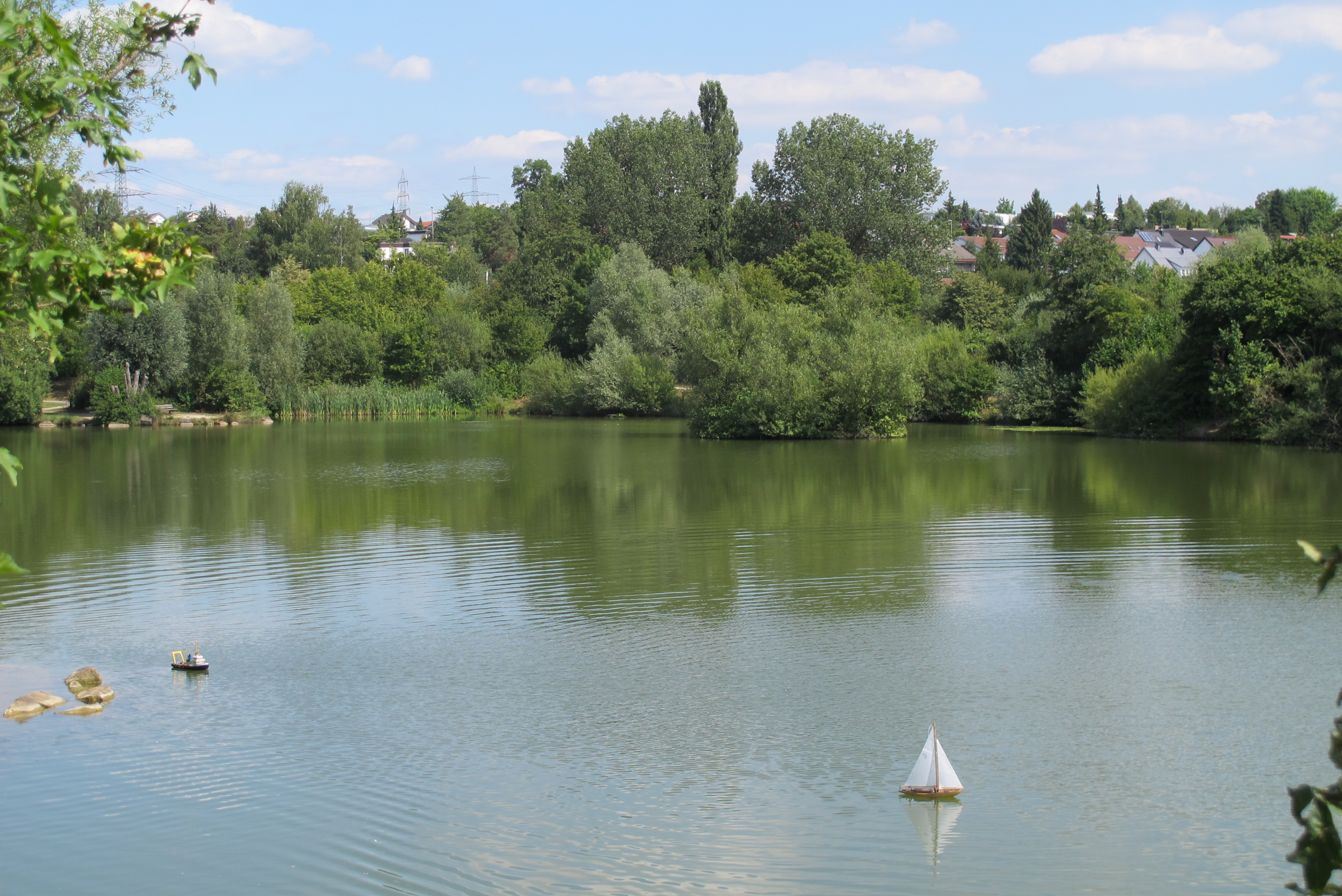 Naherholungsgebiet